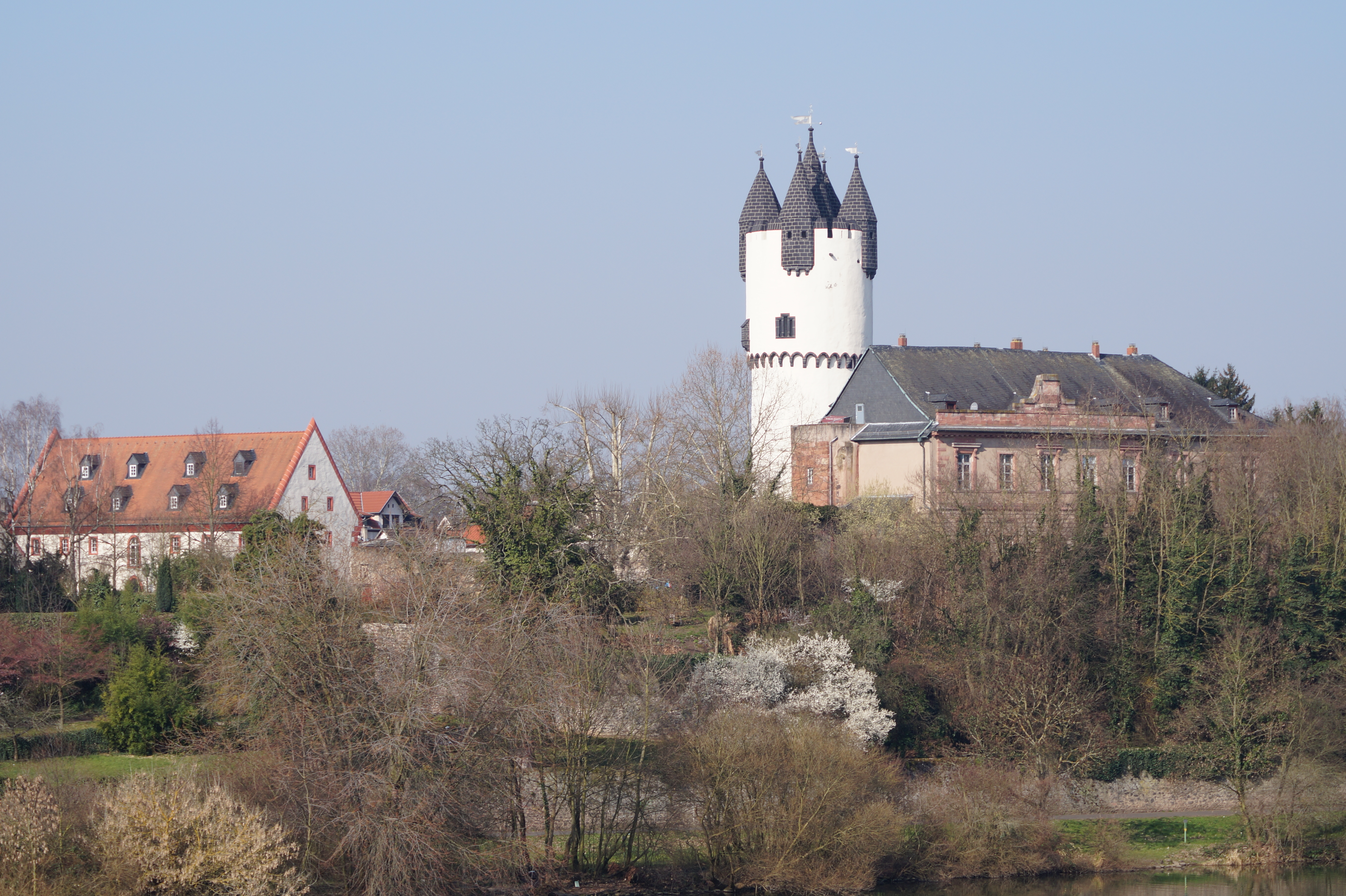 Schloss Steinheim in Hanau-Steinheim, von der Straßenbrücke der B43a fotografiert.